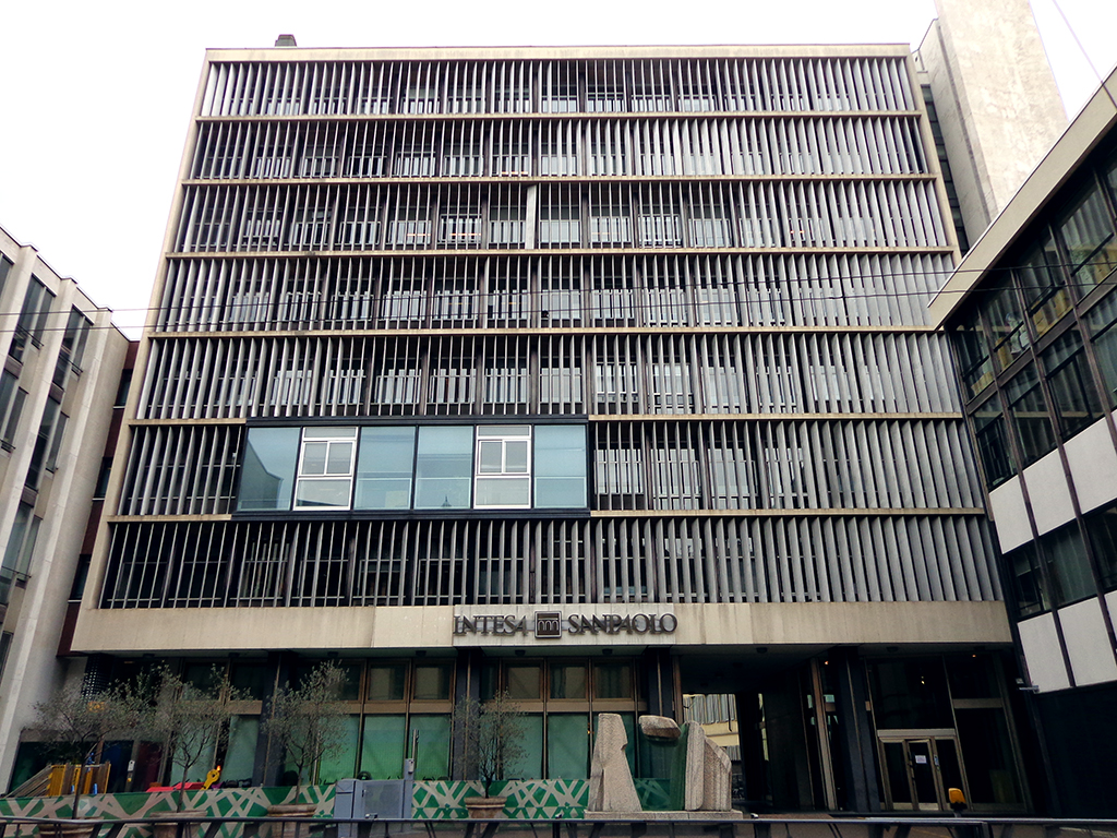 Edificio per uffici Olivetti in via Clerici 4-6 a Milano, costruito dal 1952 al 1954 su progetto di Gian Antonio Bernasconi, Annibale Fiocchi e Marcello Nizzoli.Fonte: Maurizio Boriani, Corinna Morandi, Augusto Rossari, Milano contemporanea. Itinerari di architettura e di urbanistica, Maggioli Editore, 2007, p. 109. ISBN 978-88387-4147-6 Invalid ISBN.